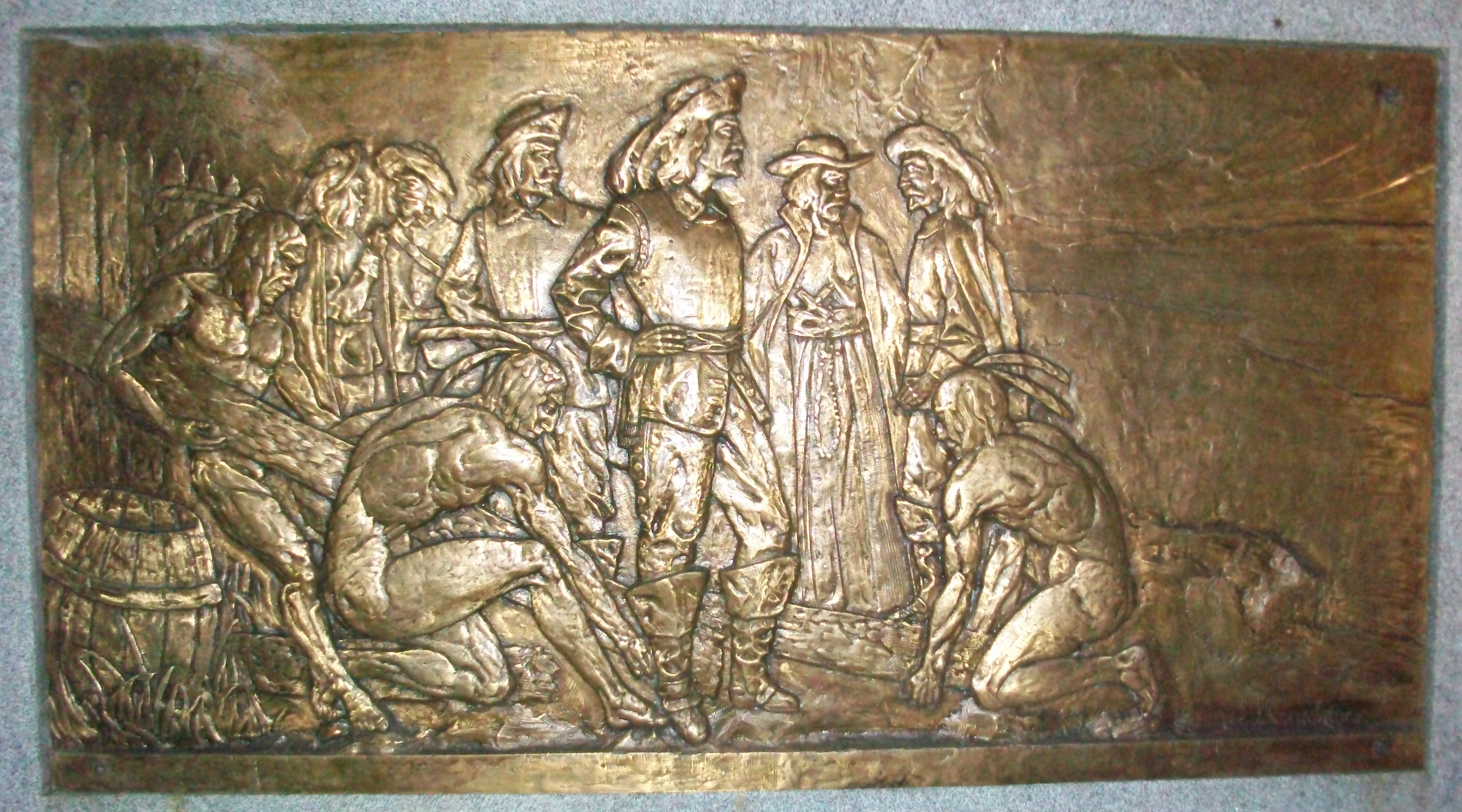 Laviolette